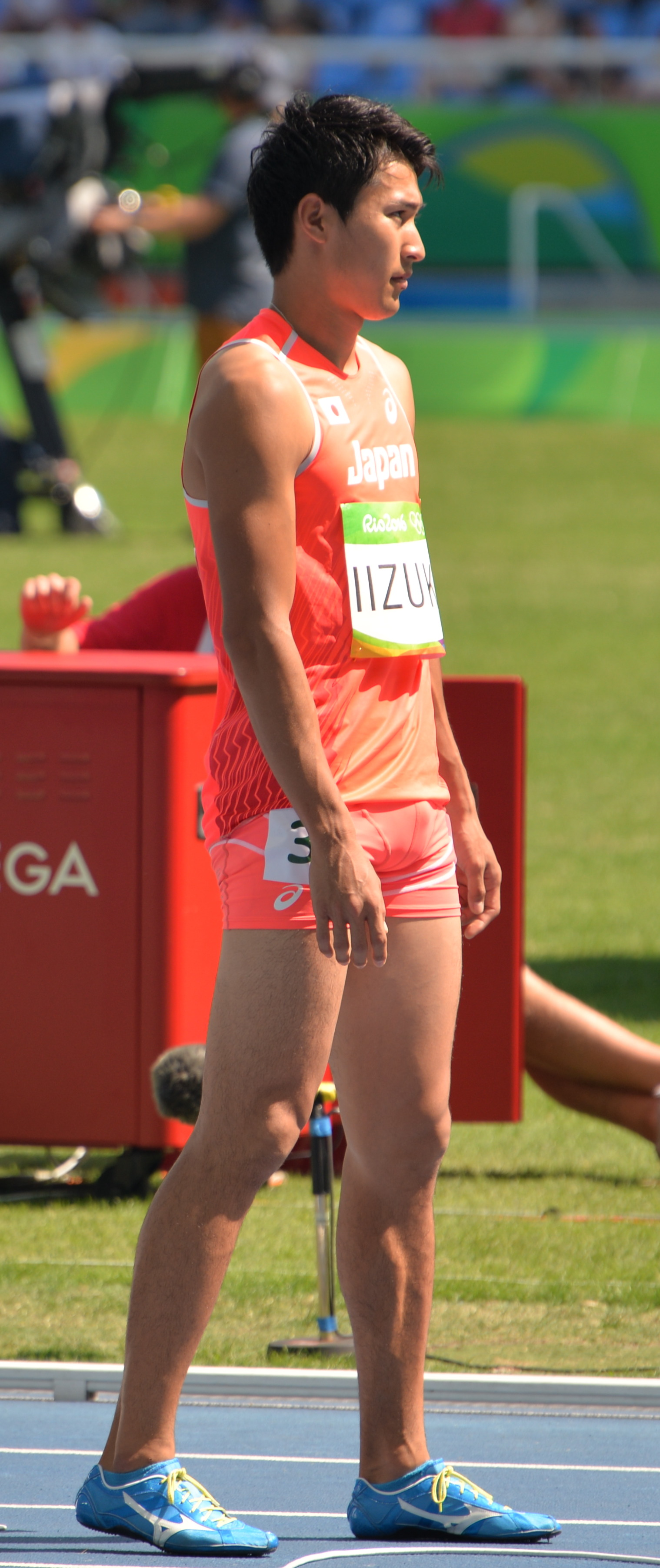 Séries du 200m Homme aux JO de Rio 2016